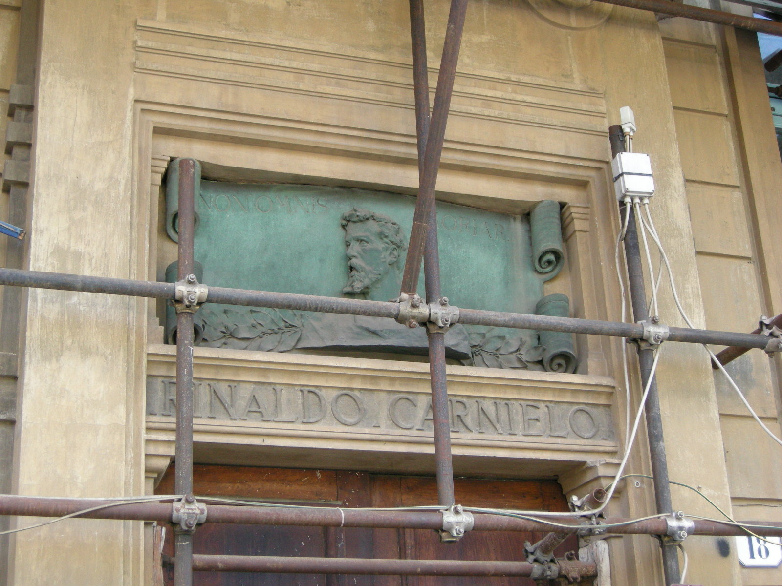 Galleria rinaldo carnielo, targa